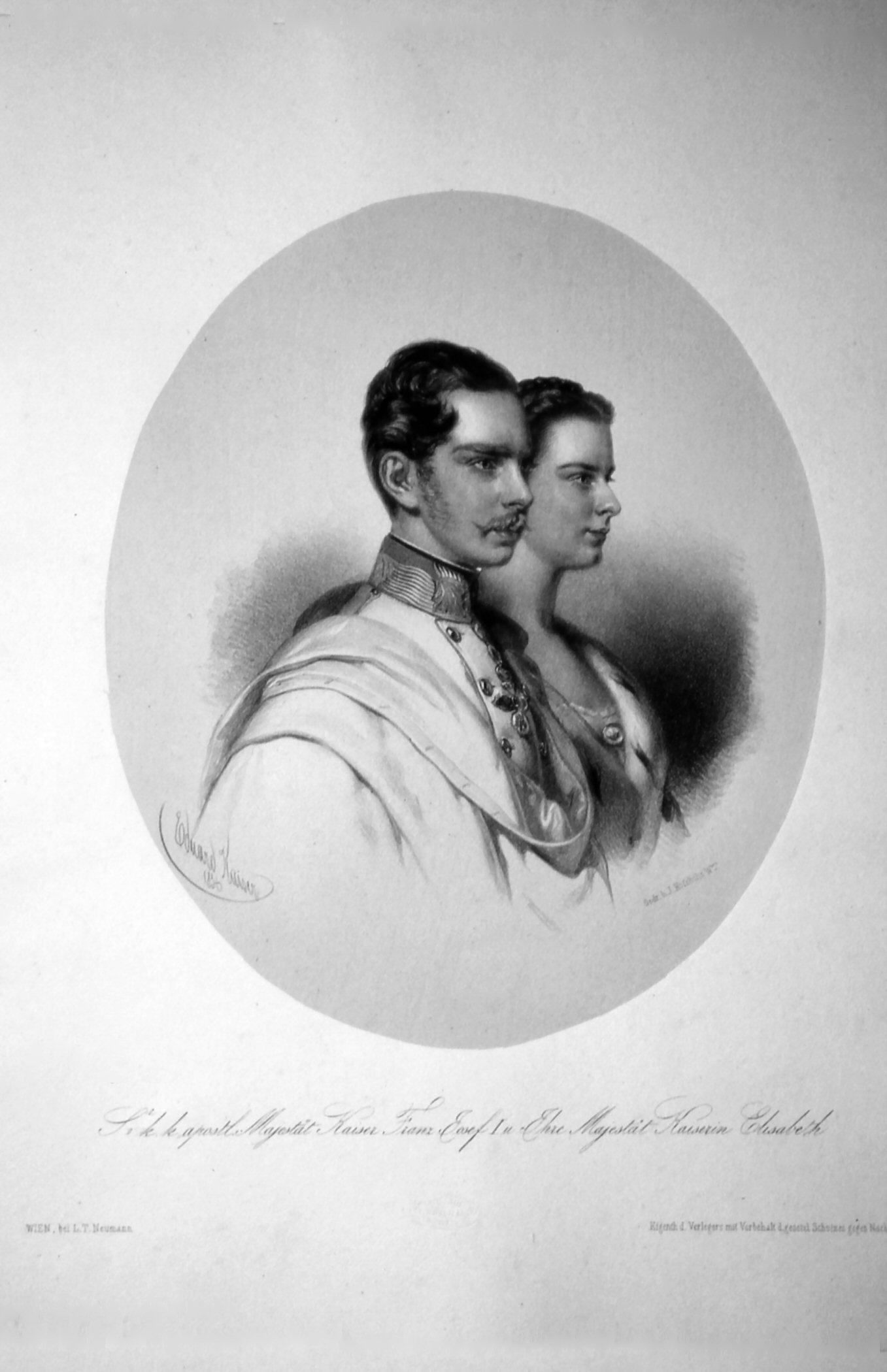 Franz Joseph I. (1830-1916), Kaiser von Österreich und Kaiserin Elisabet h (1837-1898). Lithographie von Eduard Kaiser, 1850.